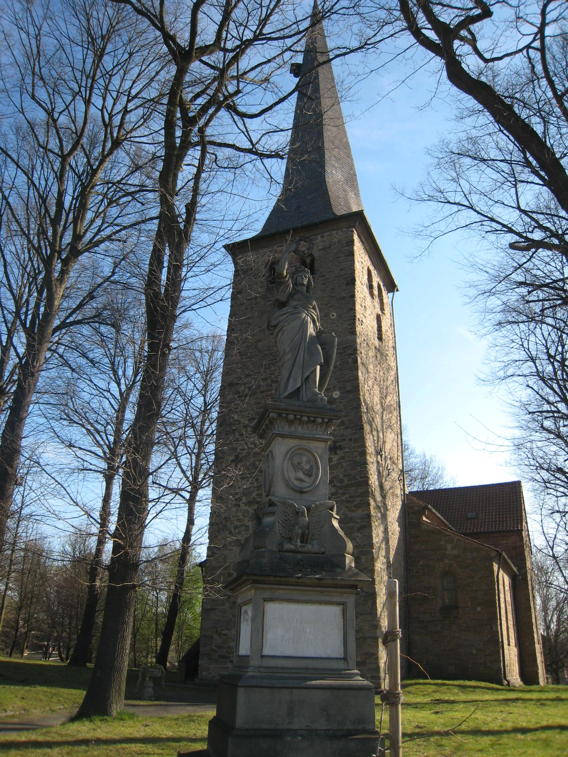 Ev. Kirche St. Dionysus Kirchderne